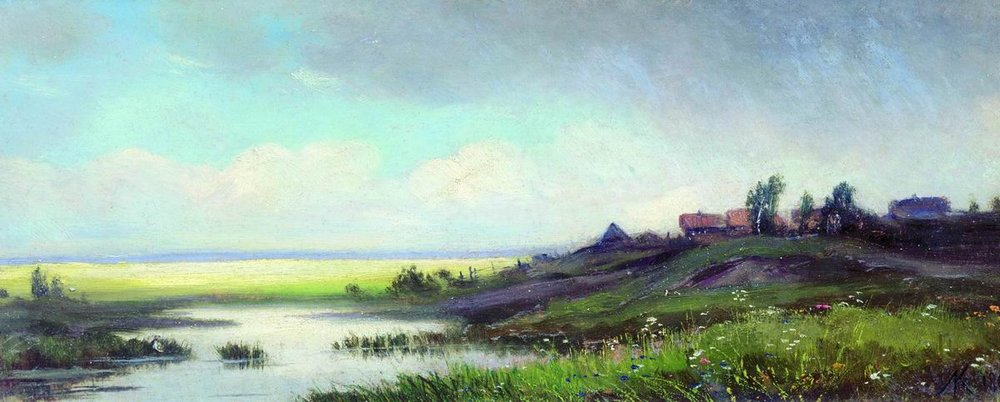 Zvenigorod.Savvina sloboda. Rain. Lev Kamenev, 1867 Саввина слобода. Дождь. Картина Льва Каменева, 1867